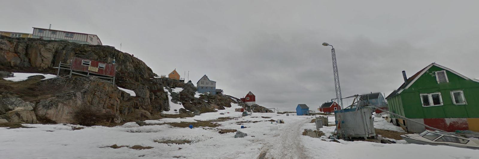 Ikerasaarsuk